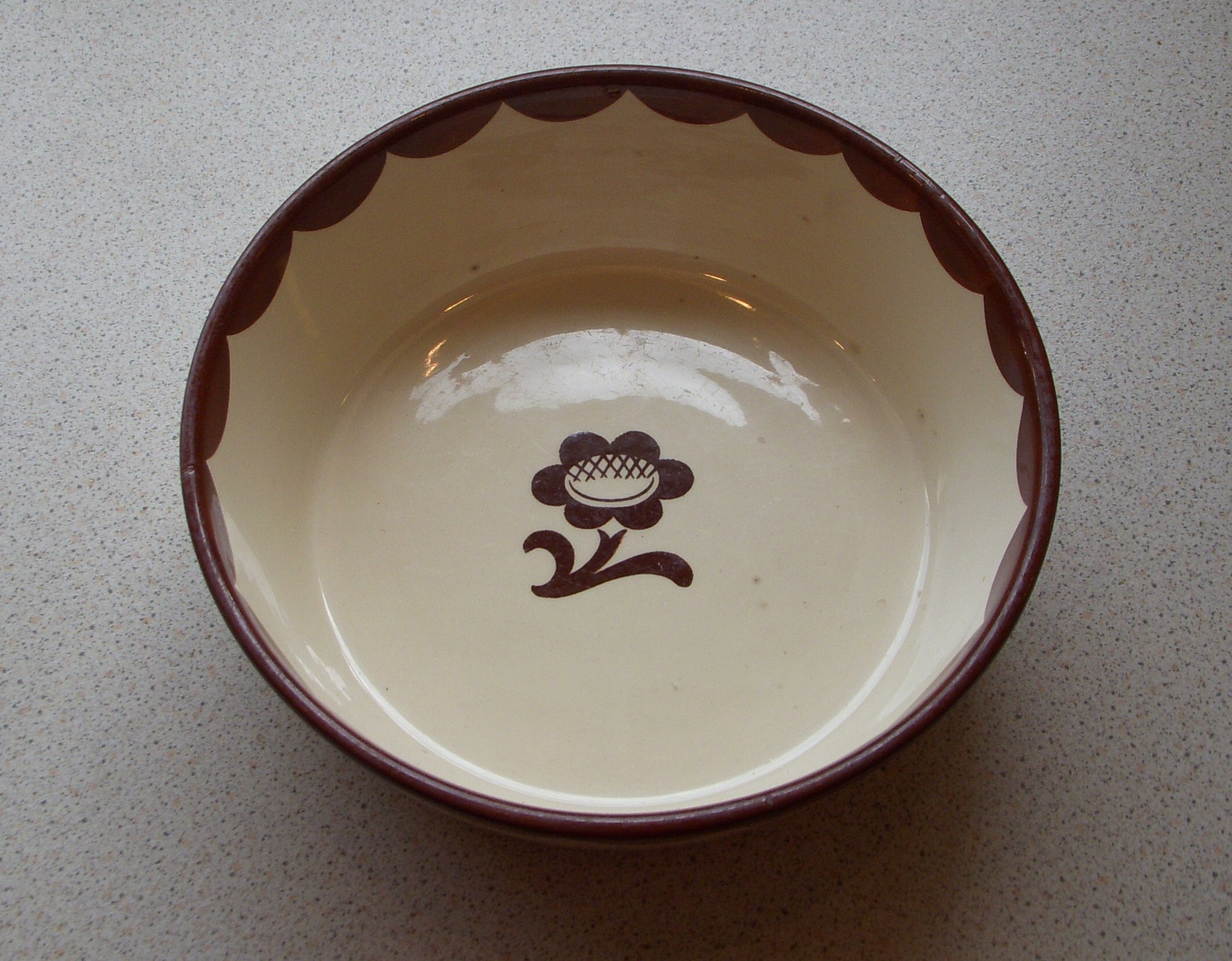 Gustavsbergs eldfasta form "PYRO", design Wilhelm Kåge